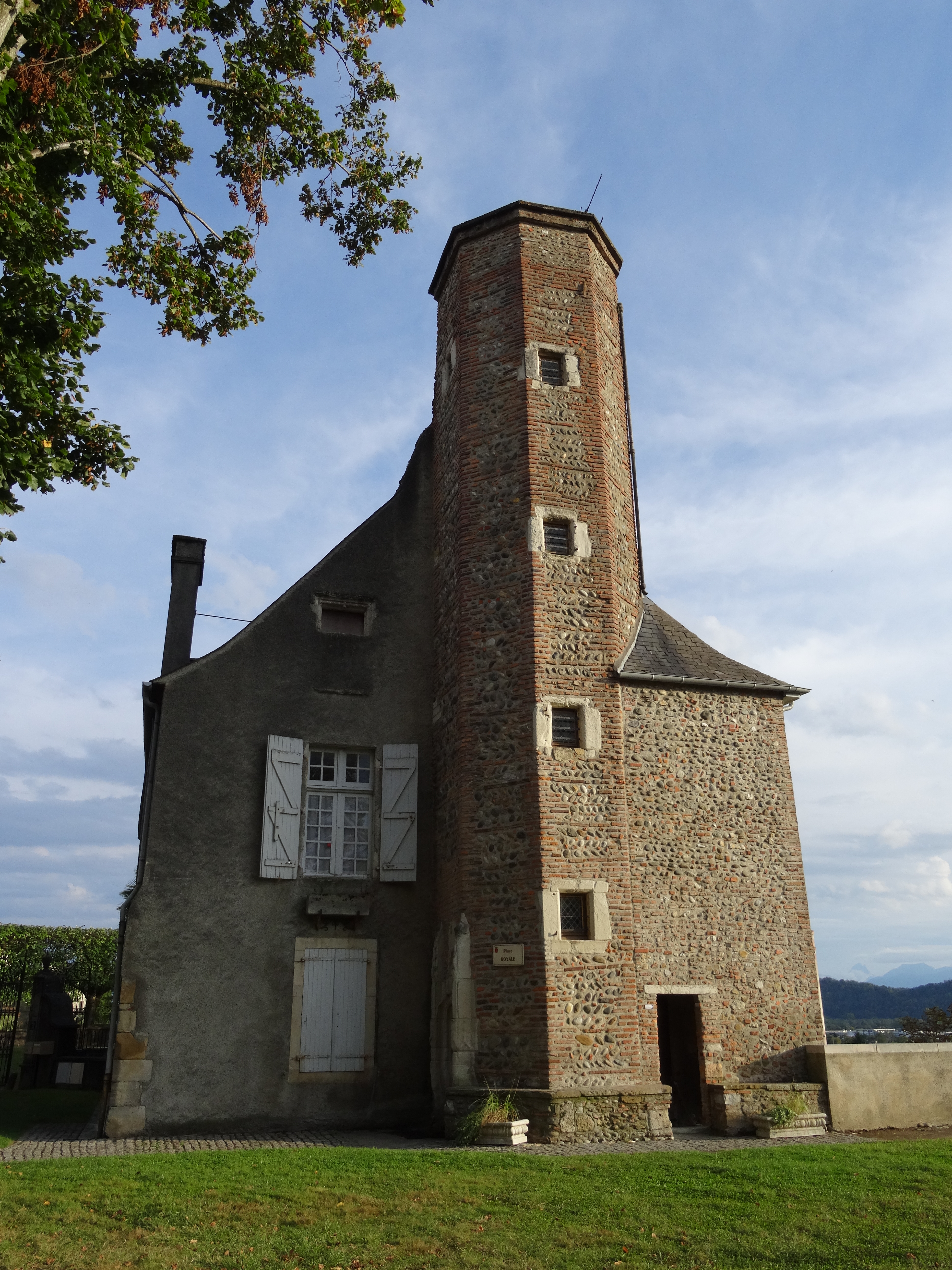 Tour du presbytère à Lescar. La tour orthogonale date du XVè siècle, les autres parties ont été rajoutées au XVIIè.